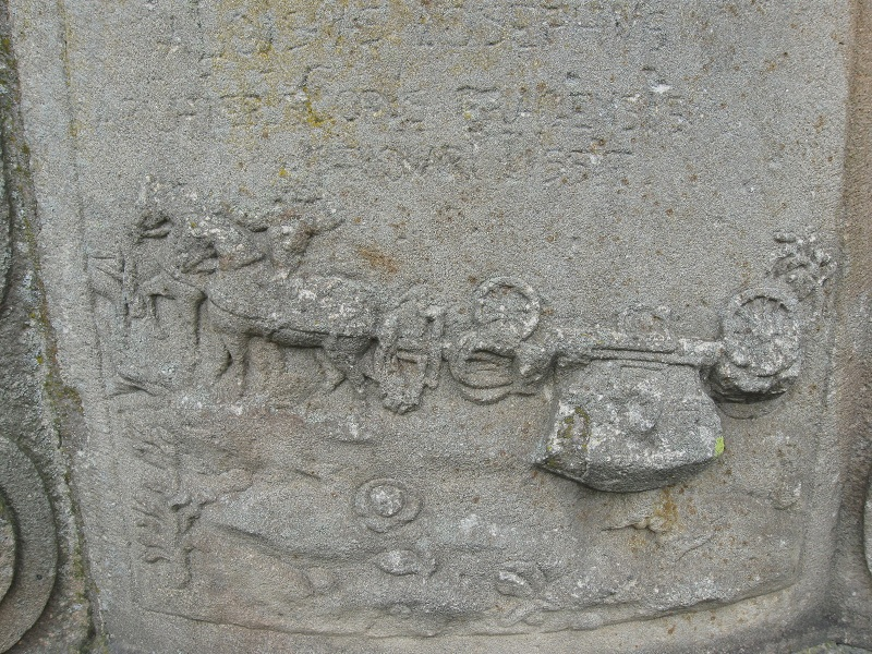 Pomník M. Alsterlové z Astfeldu (Jesenice), při silnici na Benešov, Jesenice